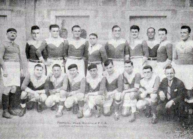 Le Football club auscitain champion de France de 1re division fédérale (1929 - Promotion) - p.66.